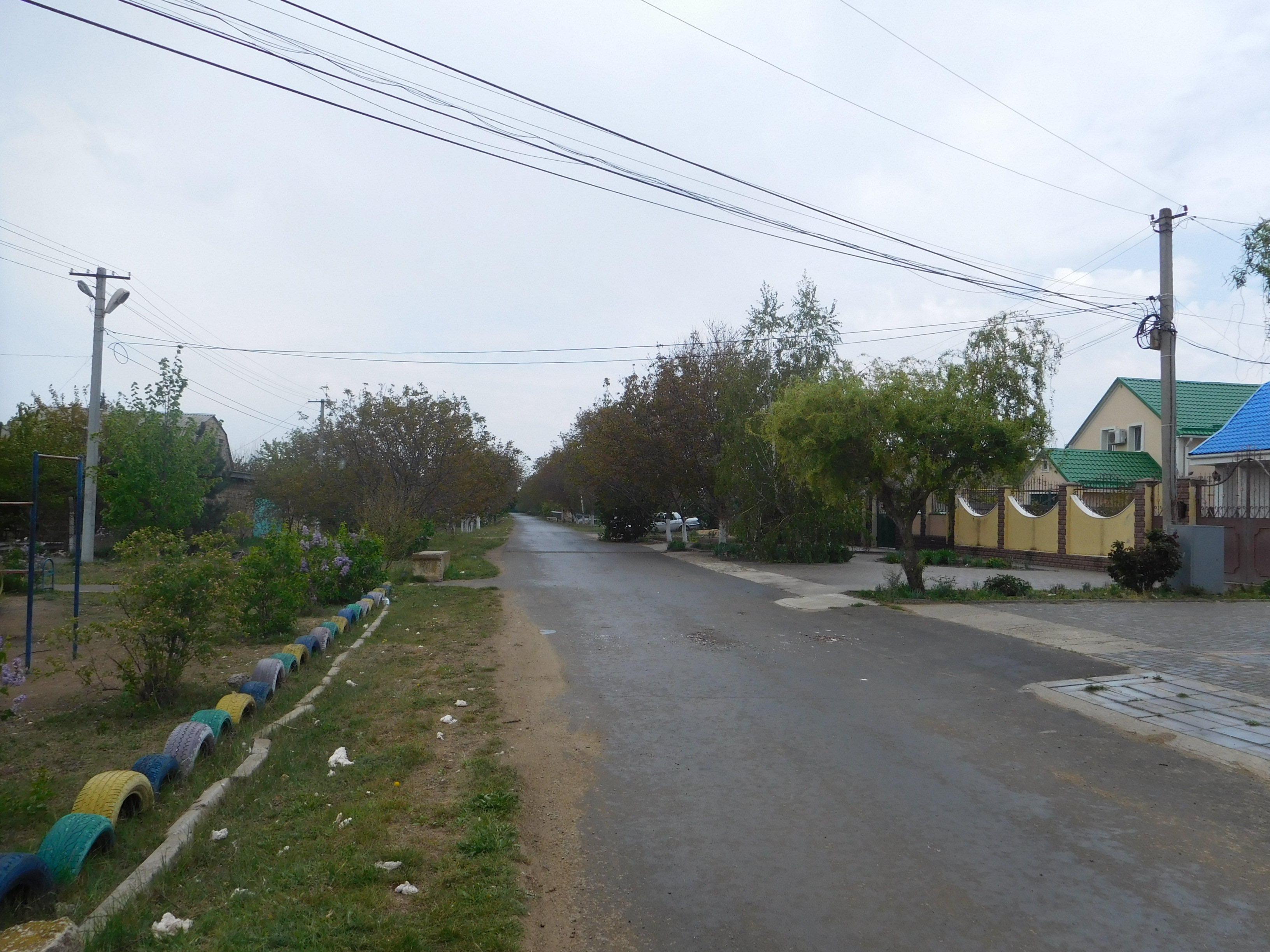 с. Латівка, Біляївський район, Одеська область